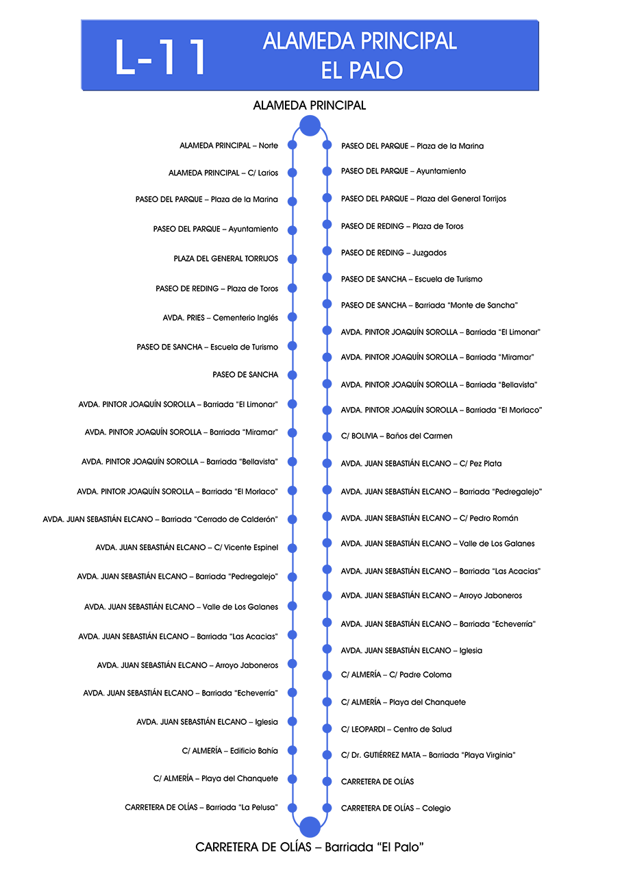 Recorrido de la línea 11 de la EMT de Málaga.